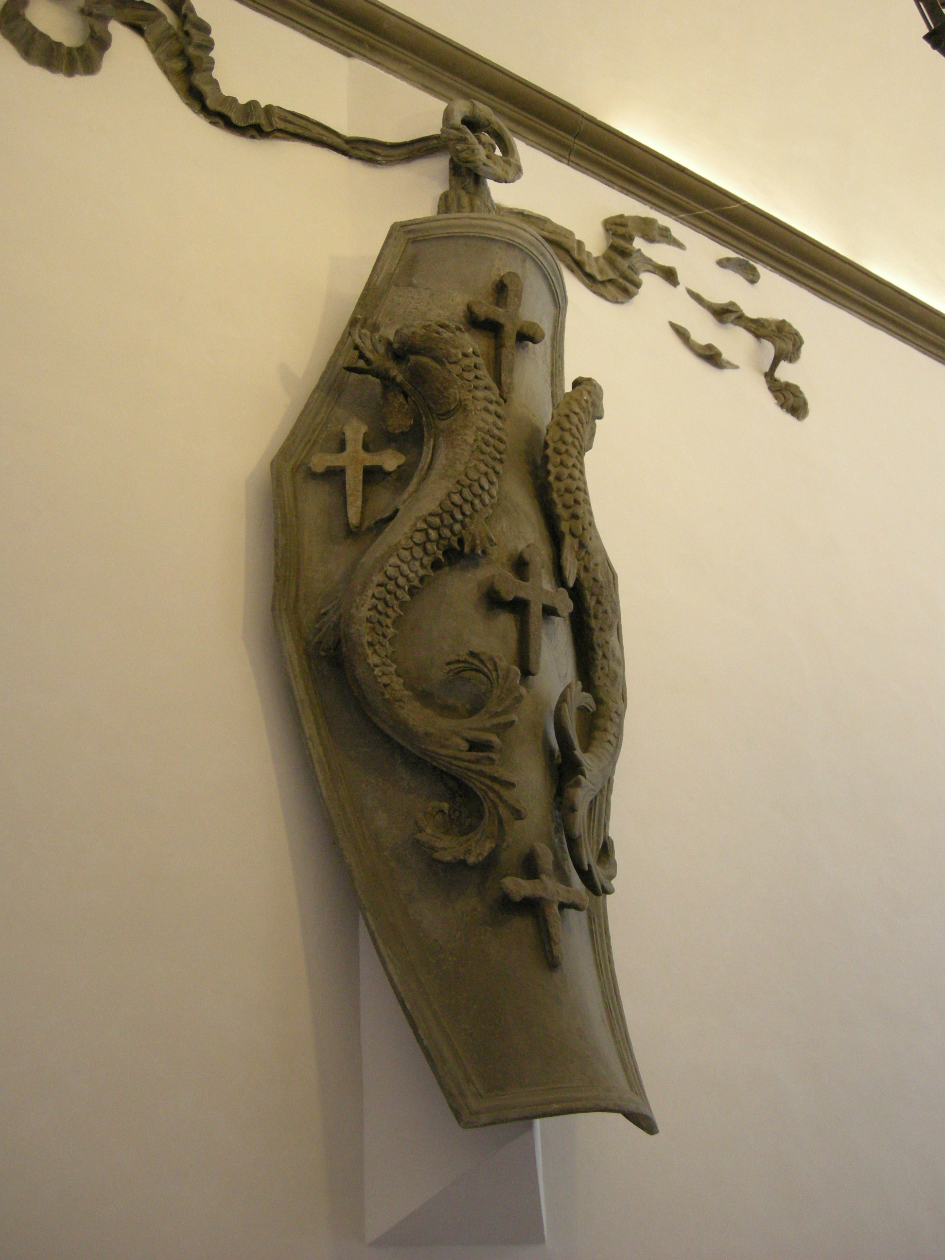 Palazzo pazzi, stemma pazzi by donatello